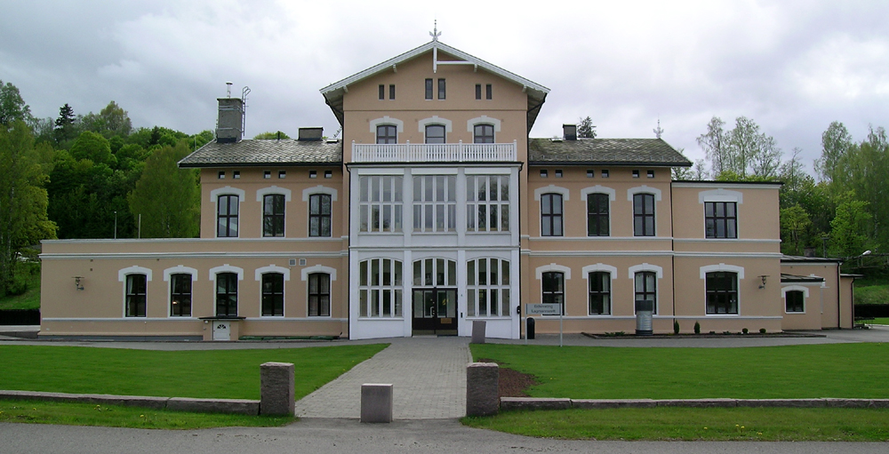 Eidsivating lagmannsrett (tidligere Eidsvoll stasjon), Eidsvoll.